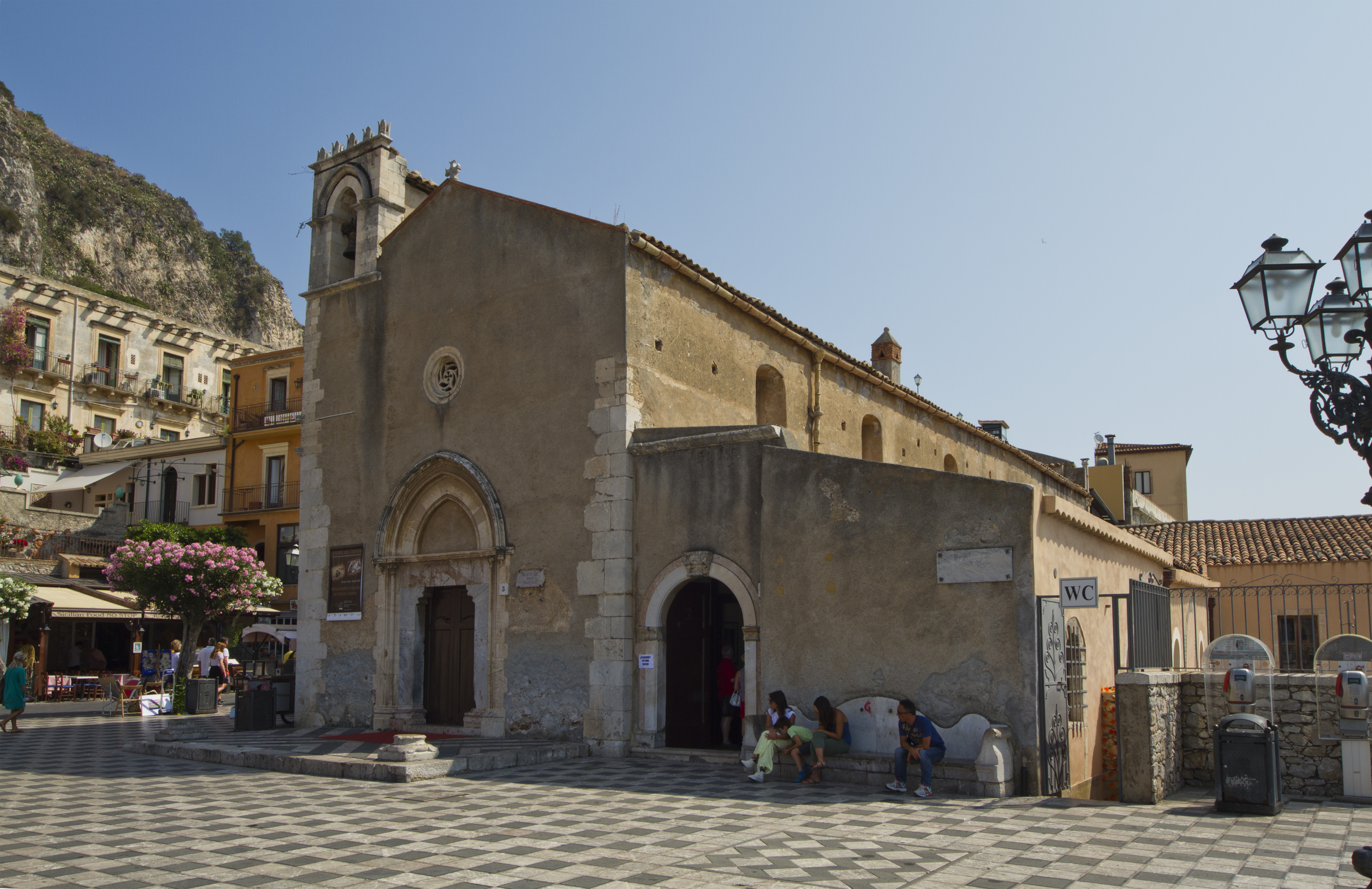 Chiesa di Sant'Agostino - Esterno.